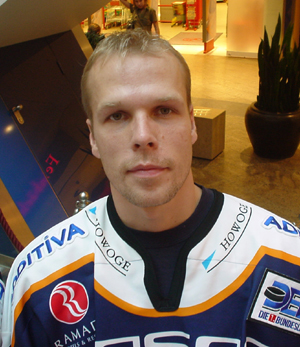 Stefan Ustorf